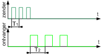 Lidar snelheidsmeting